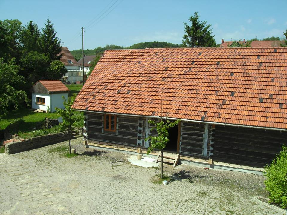 Spohns Haus: "Polenhaus"